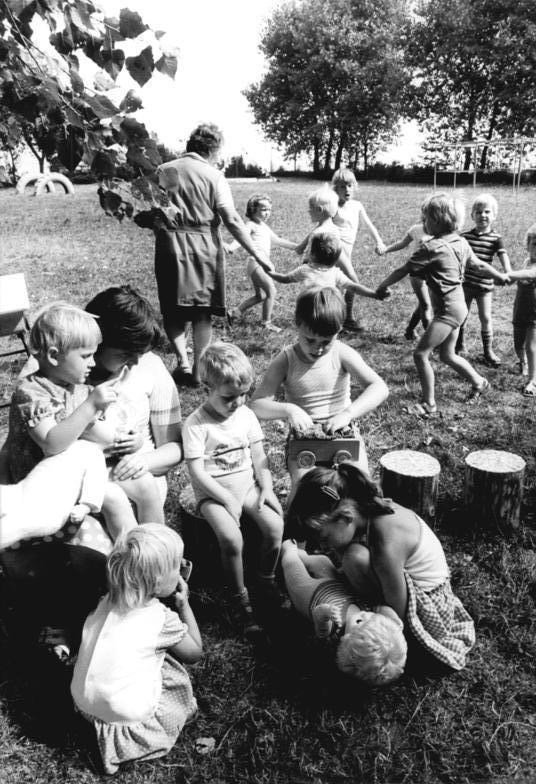 Gerdshagen, Erntekindergarten der LPG ADN-ZB Pätzold 29.7.83 Bez. Schwerin: Ernte- Die Jüngsten der Gerdshagener Genossenschaftsbauern sind auch während der Erntezeit im Kindergarten gut aufgehoben und werden liebevoll betreut. So können die Mütter als Erntekapitäne im Schichteinsatz bei der Einbringung des Getreides arbeiten. (siehe 22, 23, 24 N)